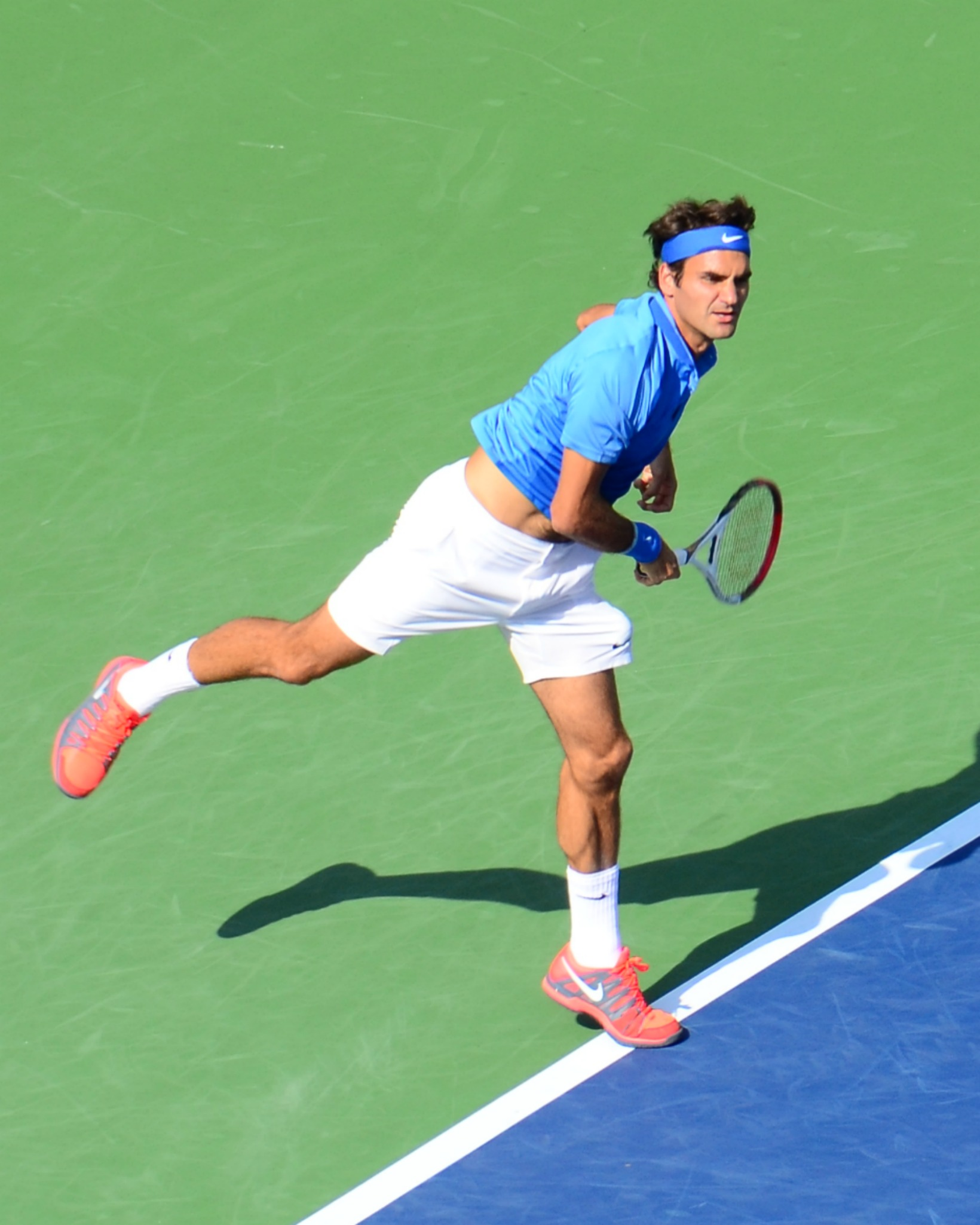 Roger Federer